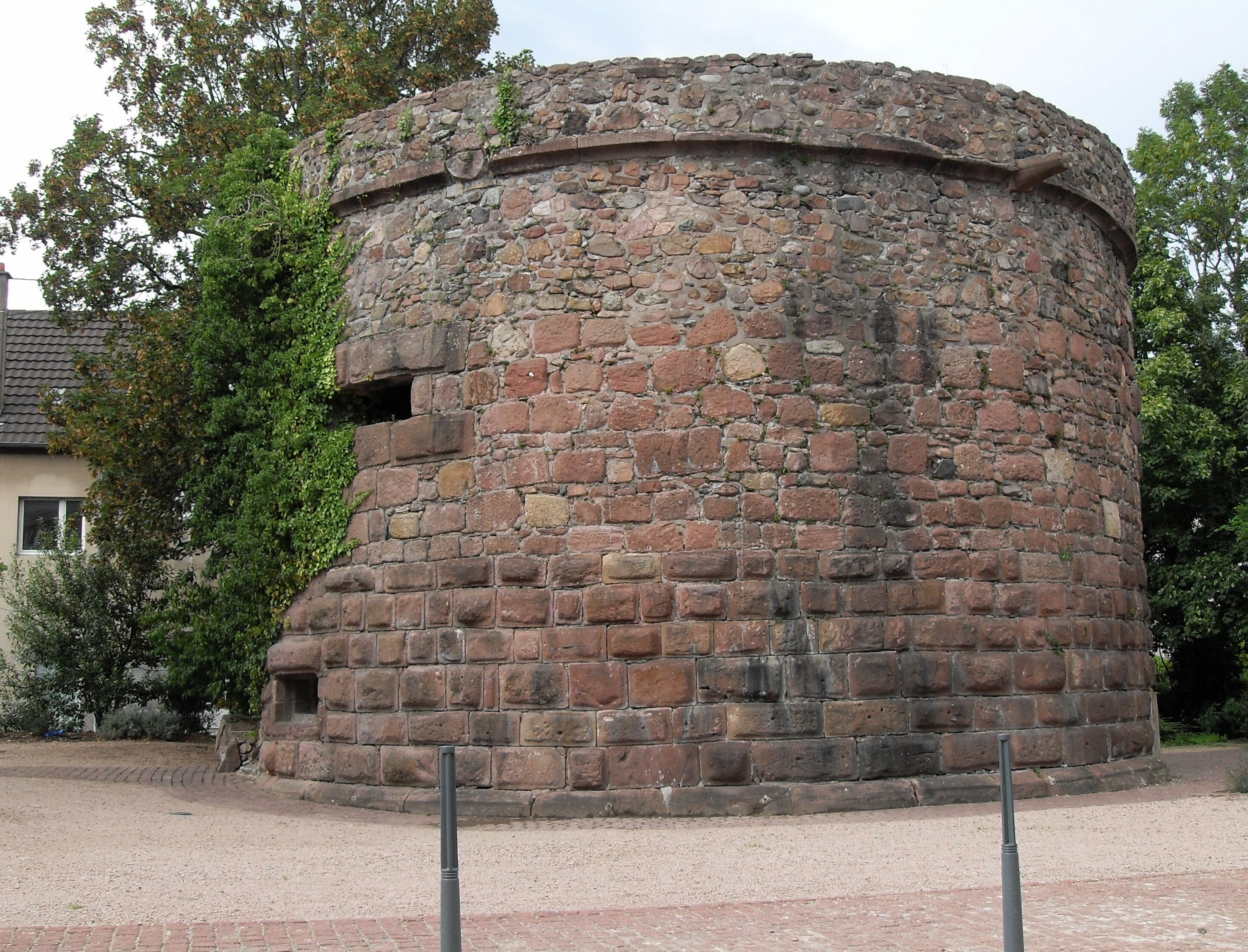 Cernay, Haut-Rhin: la massive tour ronde d'angle sud-est du rempart médiéval